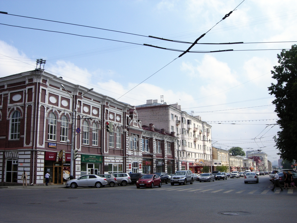 Улица Коммунистическая (Уфа)